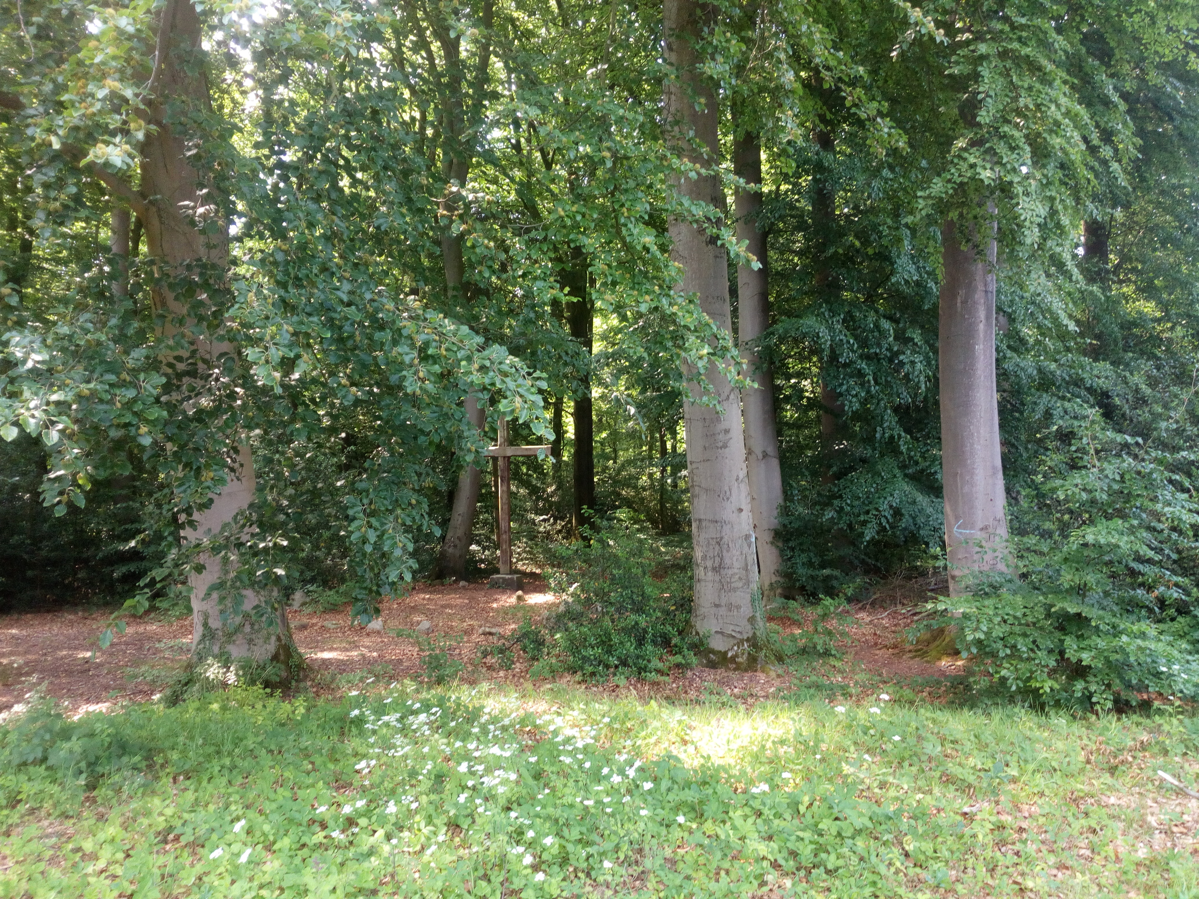 Hier ein etwas größeres Waldgebiet in Westerhausen Am Wulberg, welches durch eine Schranke abgesperrt ist. Gleich am Eingang findet man linksseitig ein verlassenes Haus und rechts ein ca. 5 m hohes Holzkreuz als Gedenkstätte mitten im Wald.